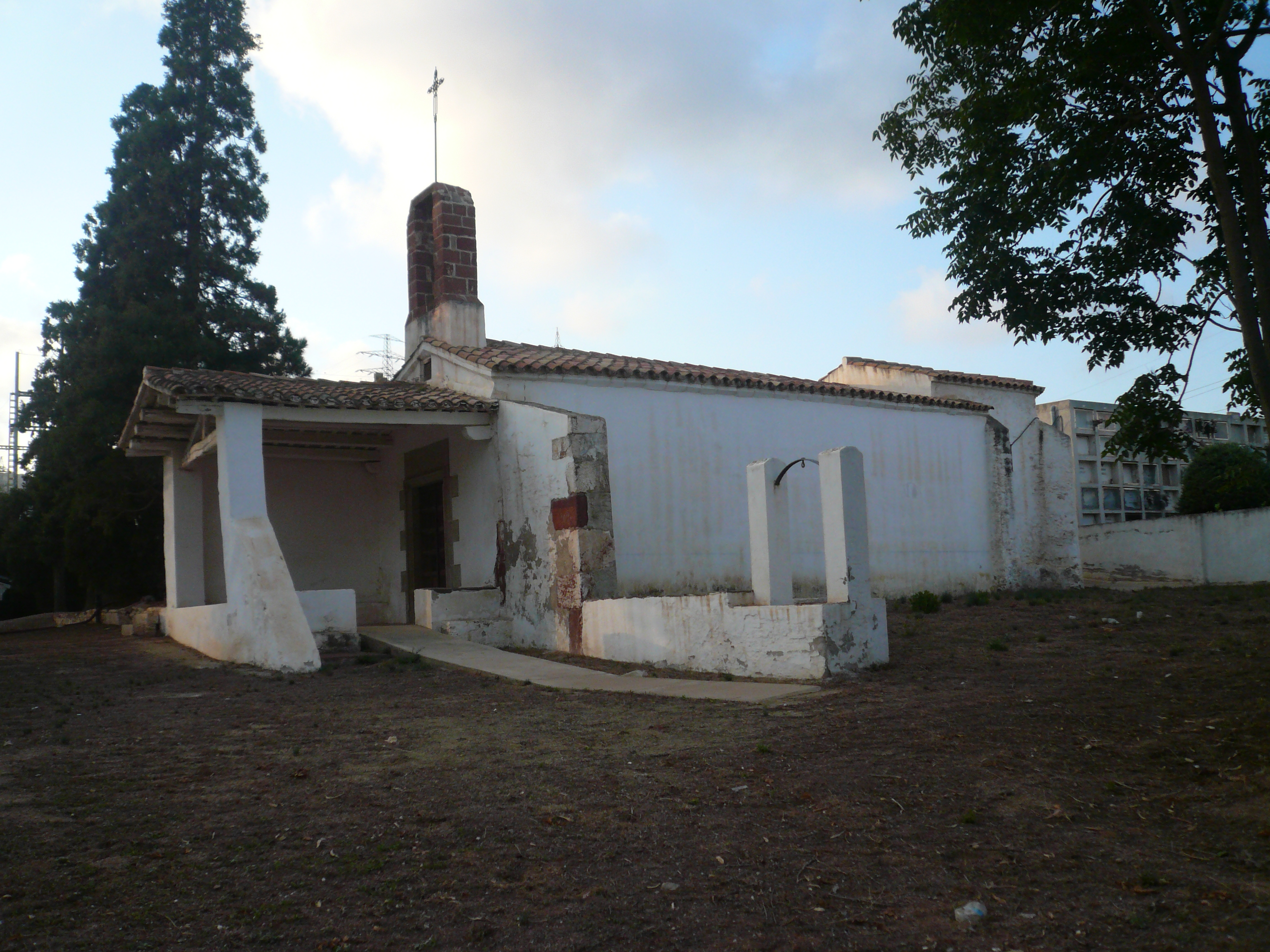 Ermita de la Mare de Déu de Sales, o Ermita de Santa Maria de Sales. Al costat del cementiri (Viladecans). Object location41° 19′ 26.1″ N, 2° 01′ 42.51″ E